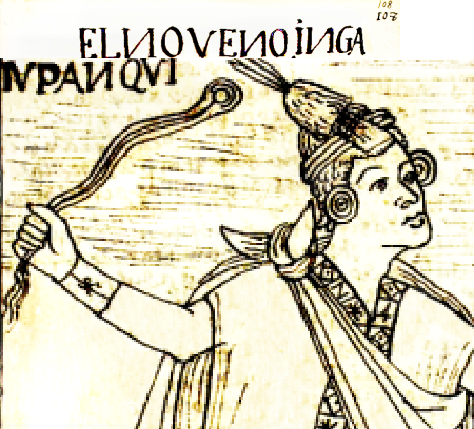 Detalle de un dibujo de Guamán Poma de Ayala que muestra a Pachacútec usando una honda.